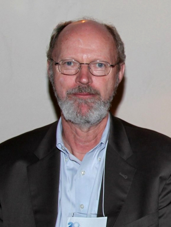 Nobel Prize Winner Bob Grubbs